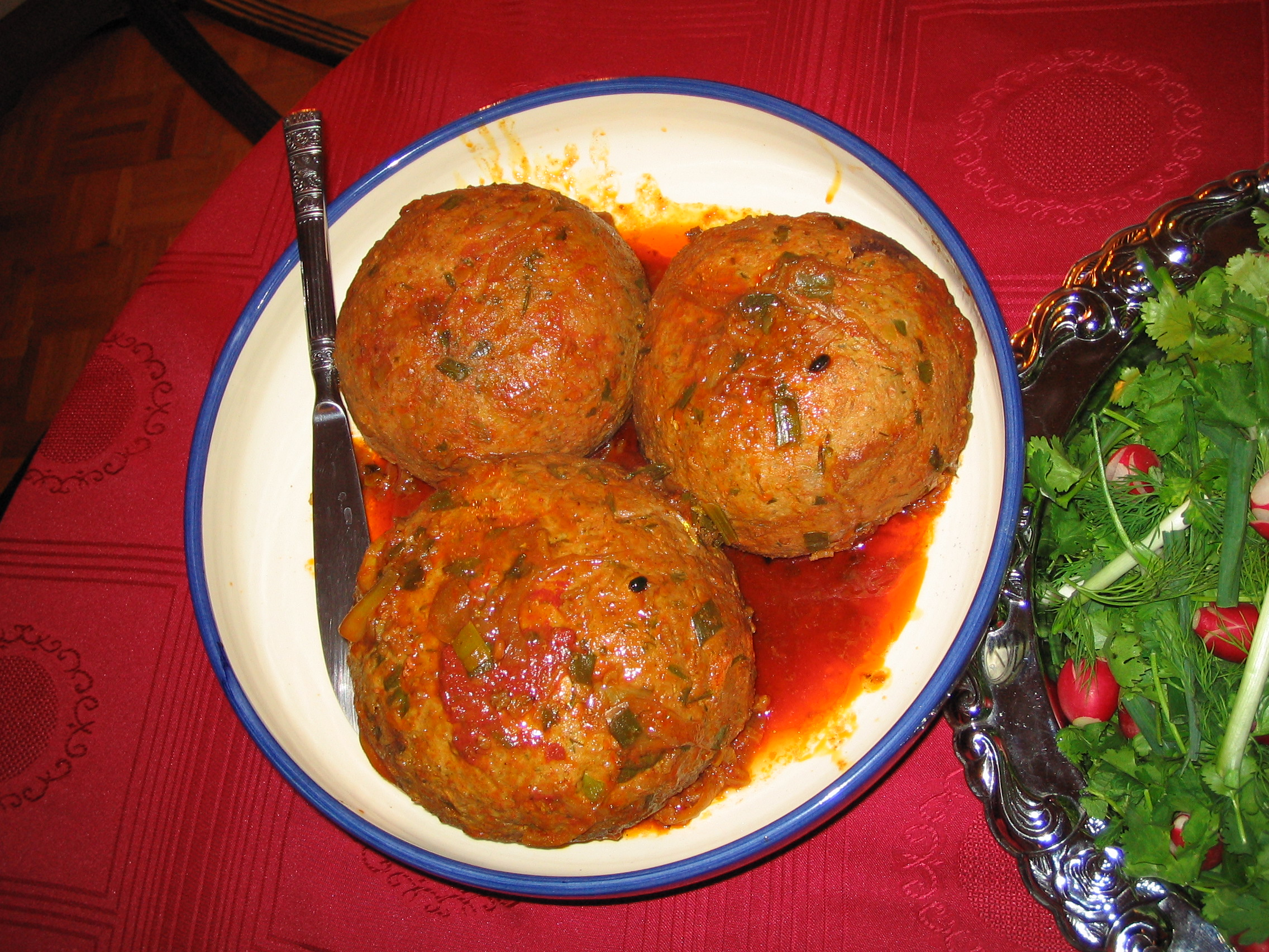 Koofteh Tabrizi, from Tabriz